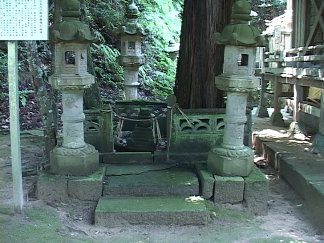 Tomb Yamana Yajiroh,Tottori-city